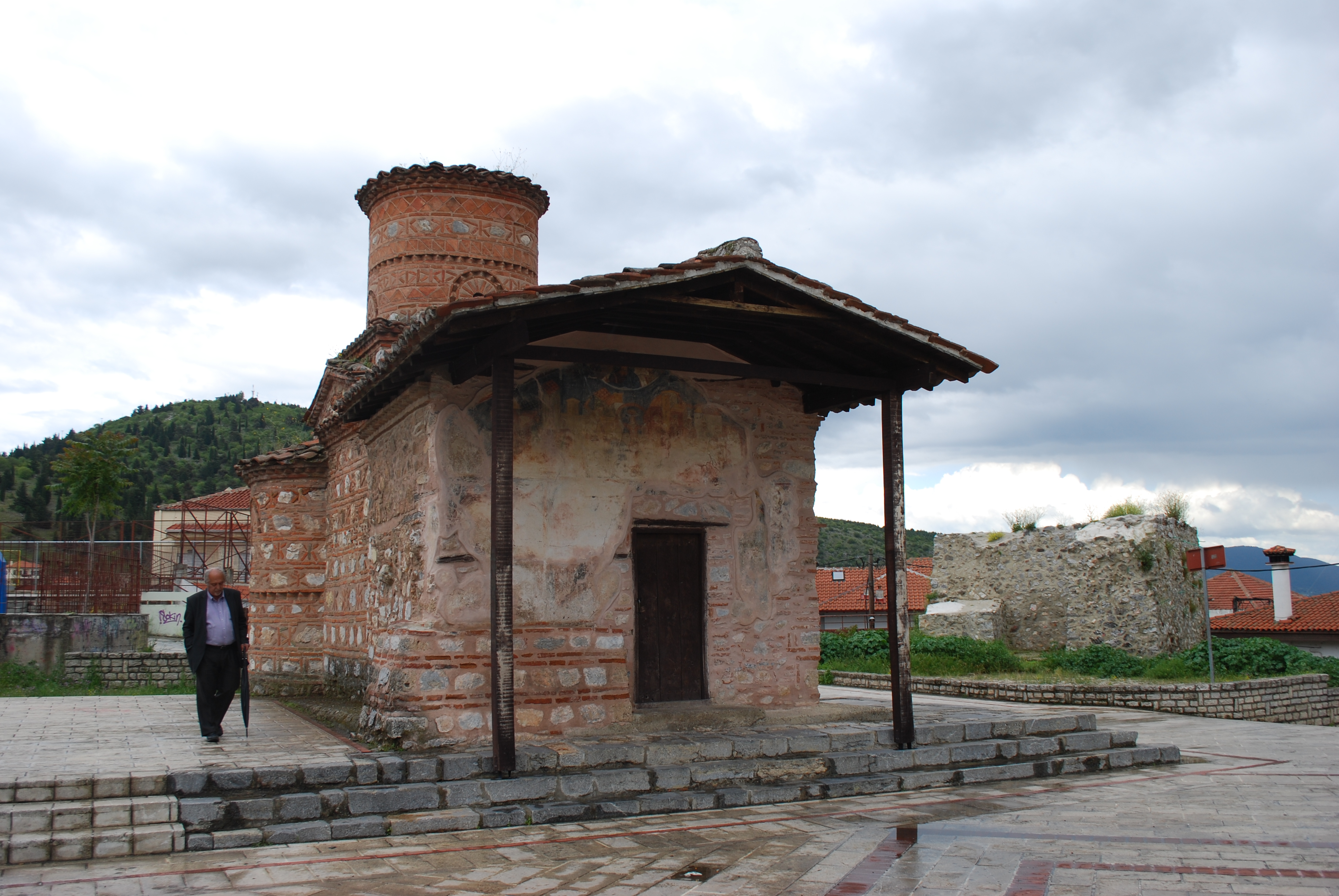 Vue de Kastoria.